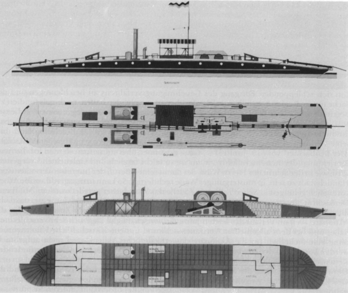 Zeichnung eines Neckarkettendampfers (1878)